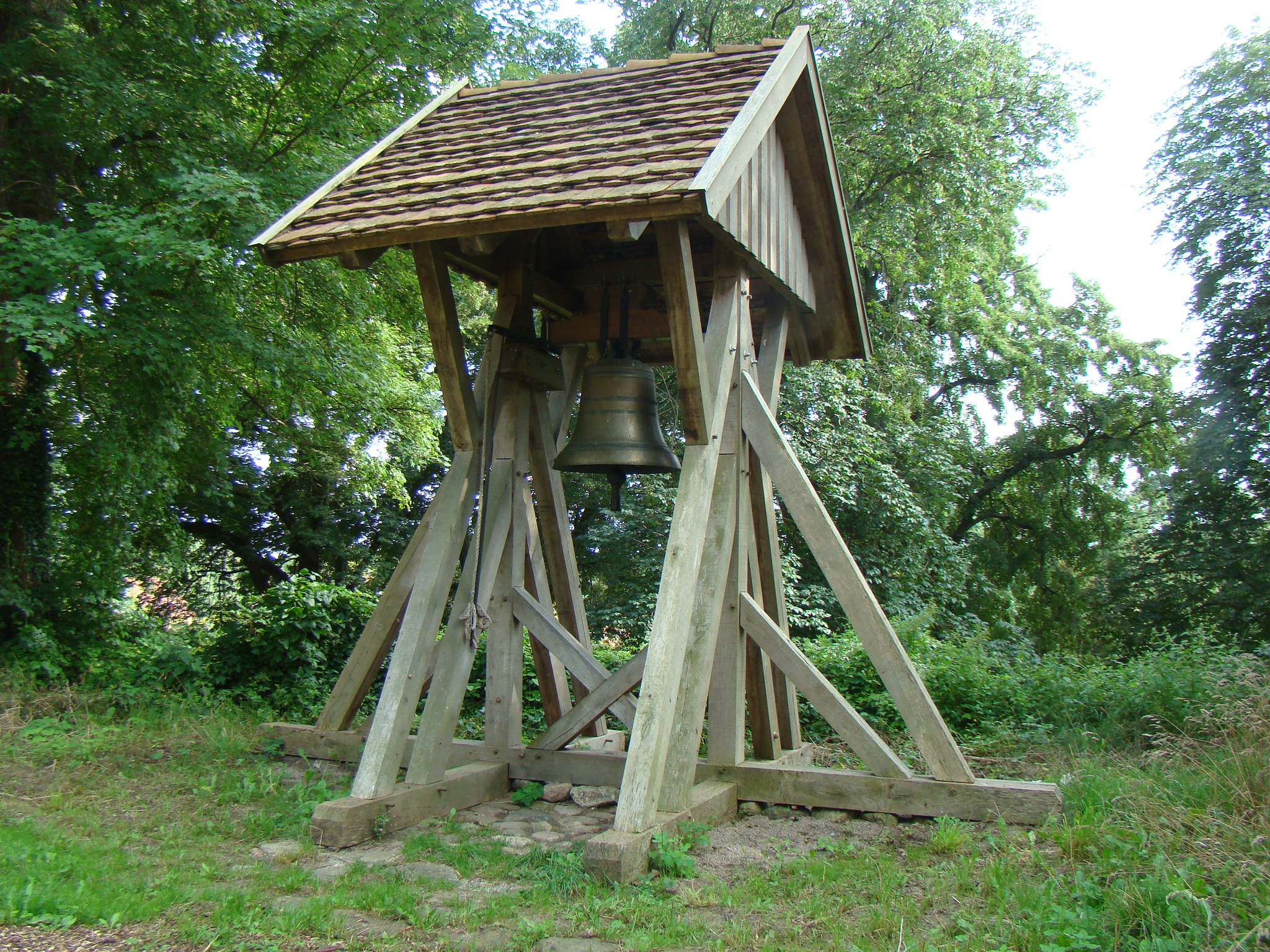 Glockenstuhl bei der Kirchenruine Schorssow. Foto: Peter Schmelzle, August 2011.